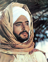 Aly Ben Ayed